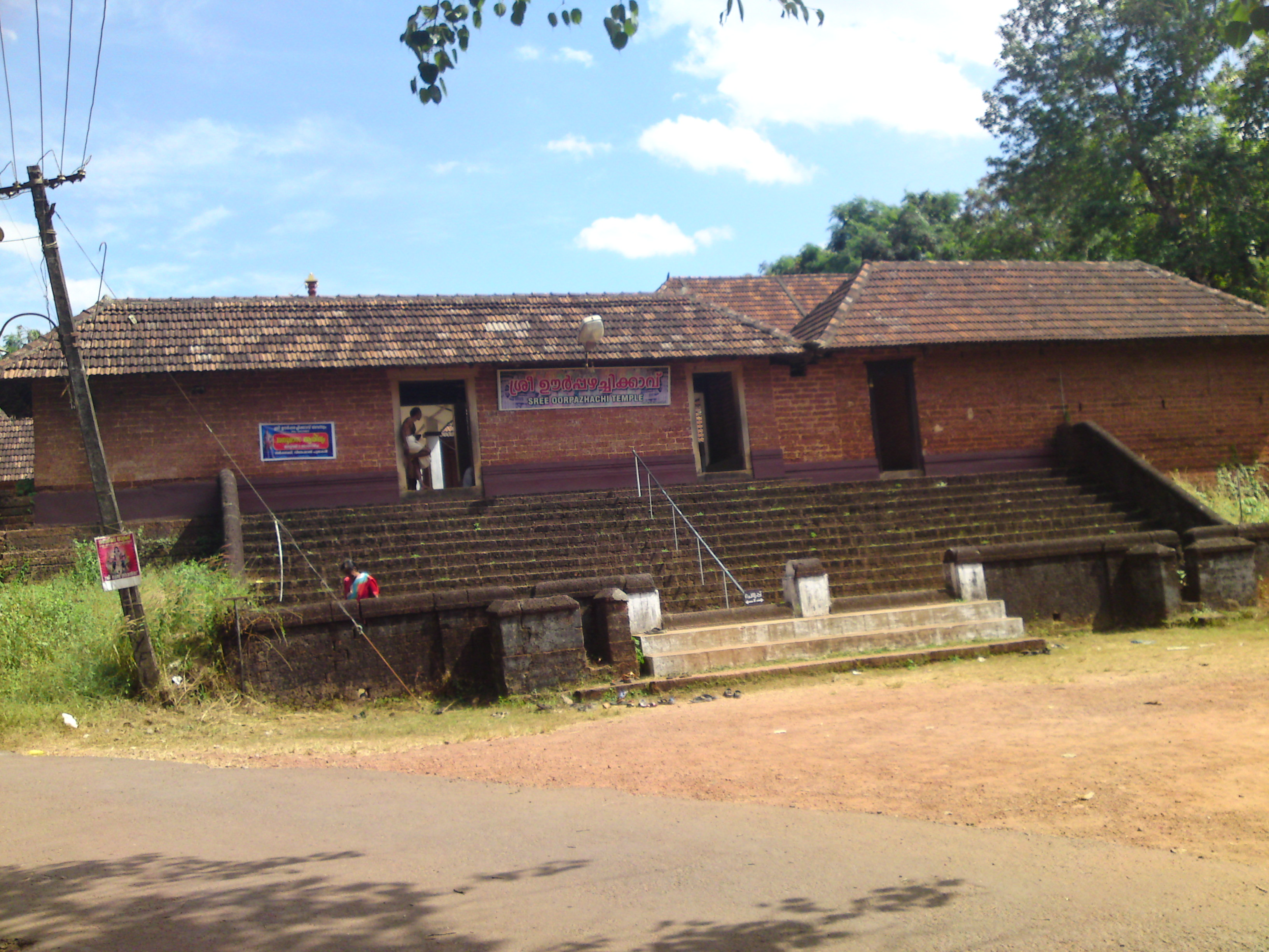 എടക്കാട്‌ ഊര്പഴച്ചി കാവ്